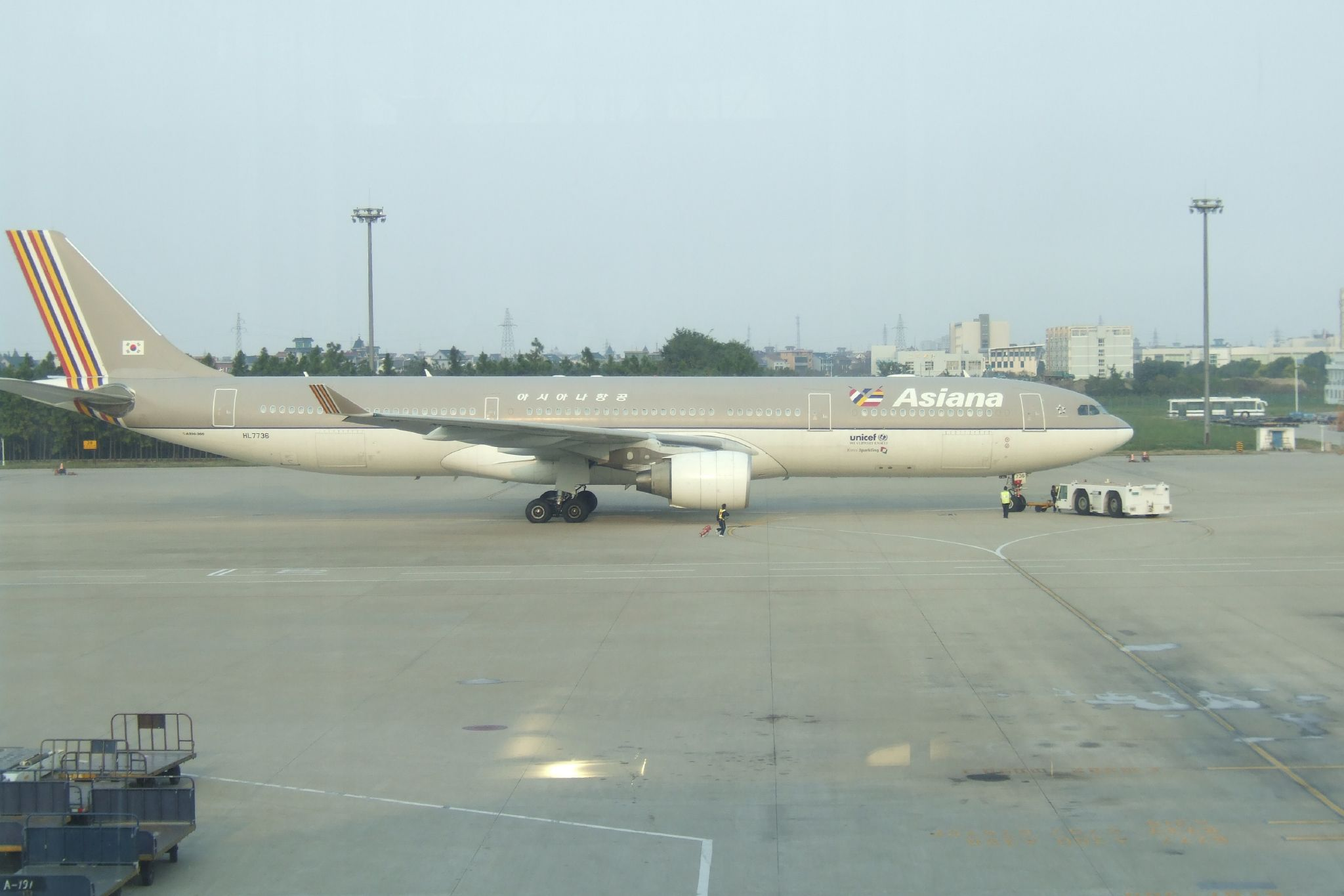 萧山机场的韩国飞机